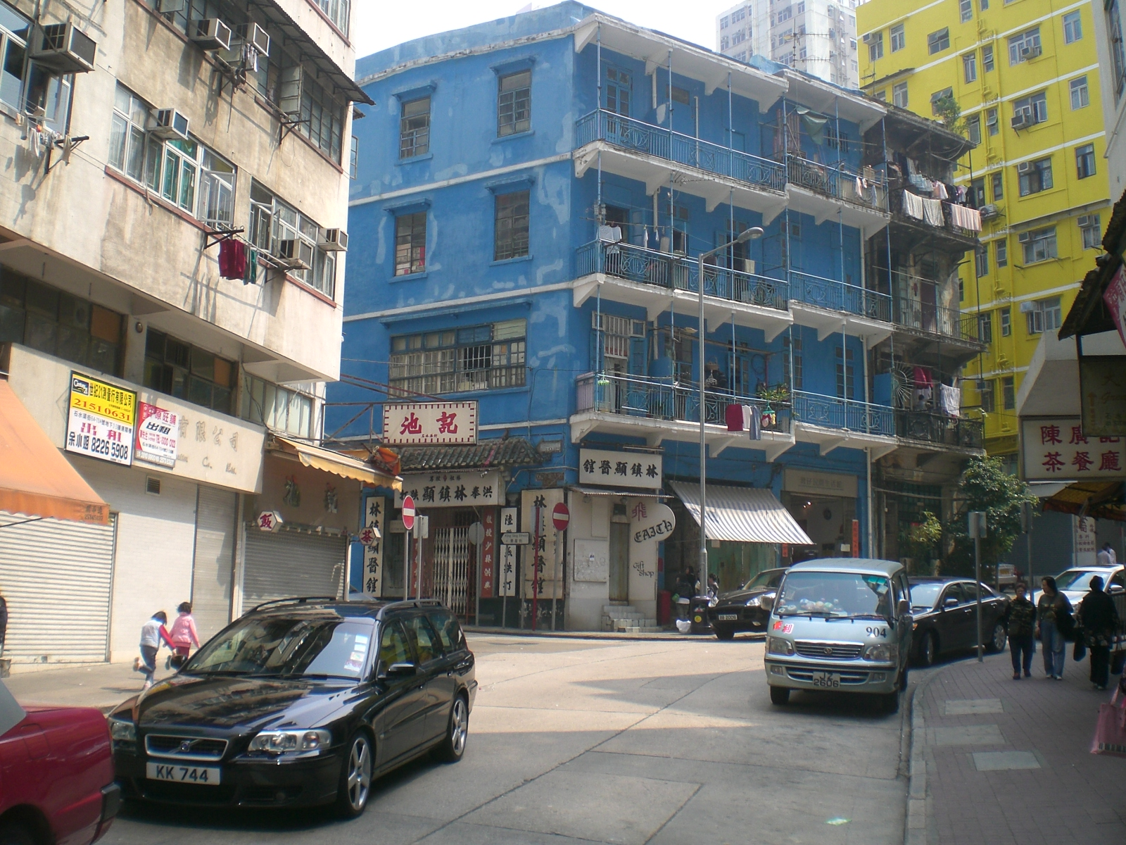 石水渠街藍屋